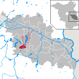 Wendisch Rietz in Brandenburg (Country) - District Oder-Spree